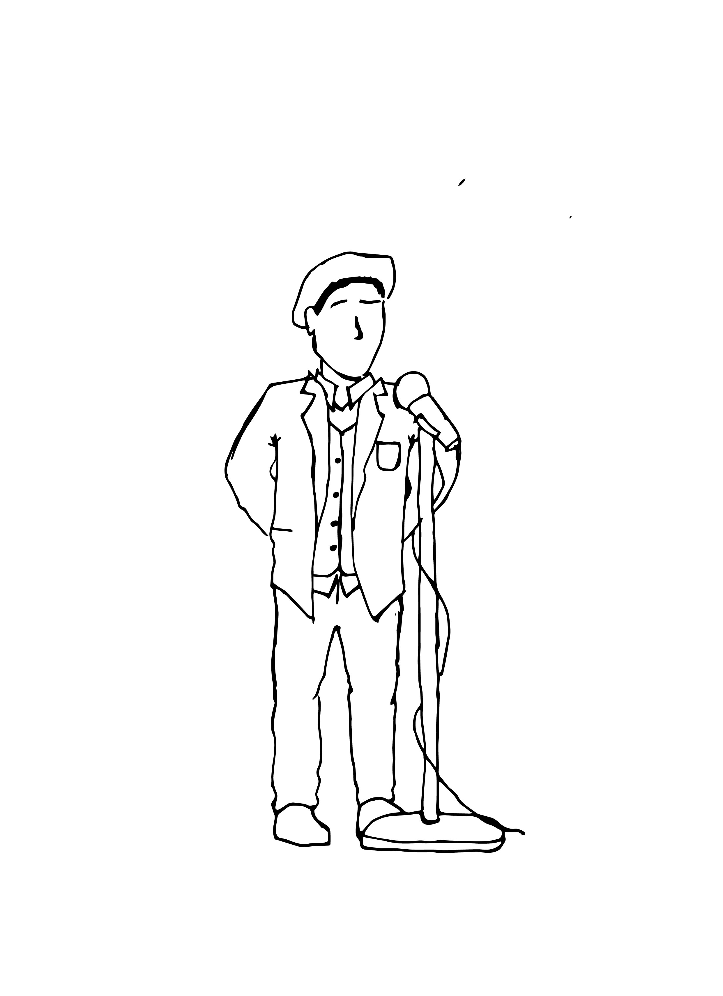 Bertsolari baten marrazkia, bertsoa botatzen. Egilea: Aitor Abio